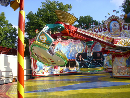 HUSS Magic No. 3, Hersteller HUSS